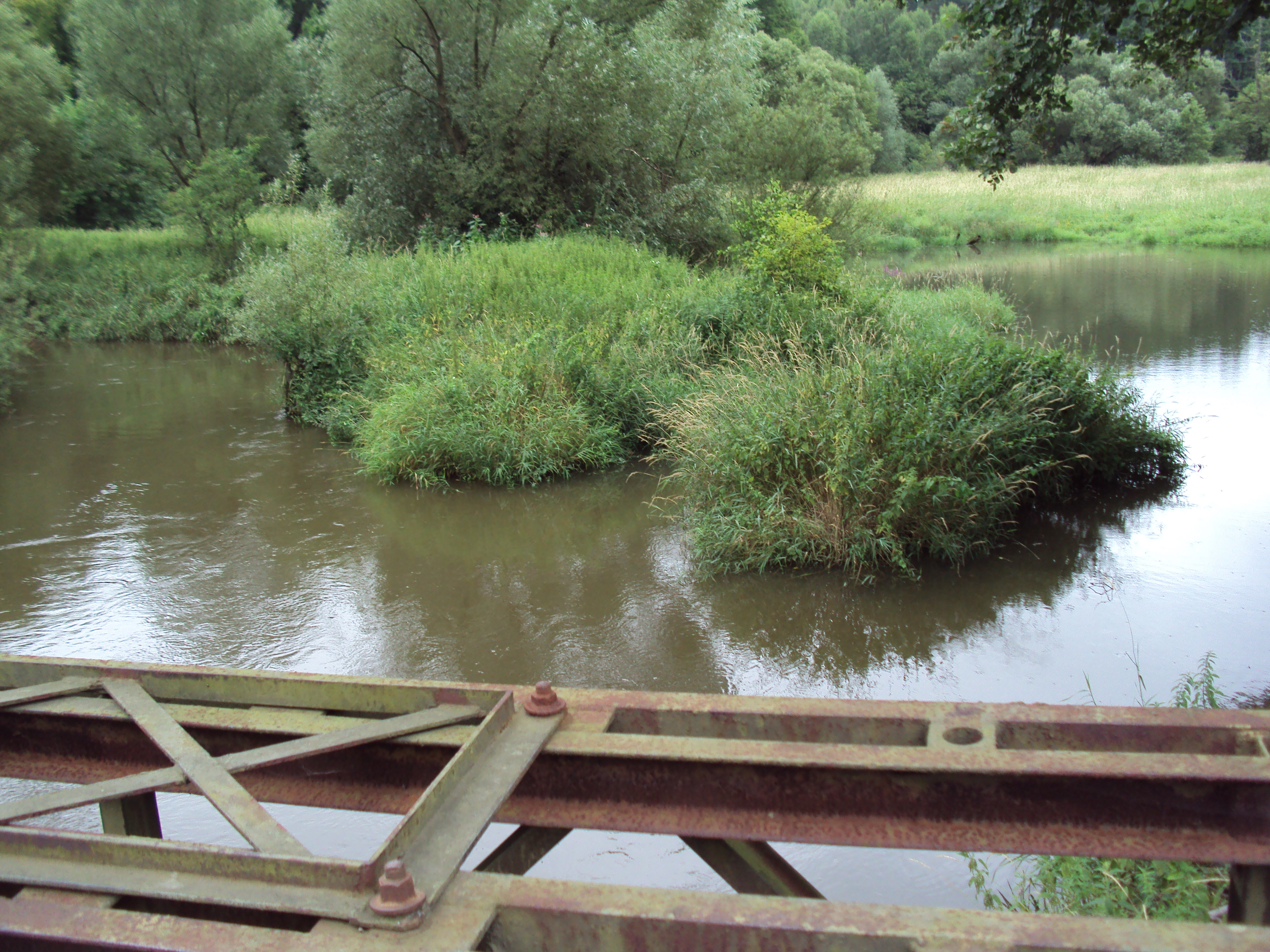 Meandry Ploučnice v Heřmaničkách, východně od České Lípy